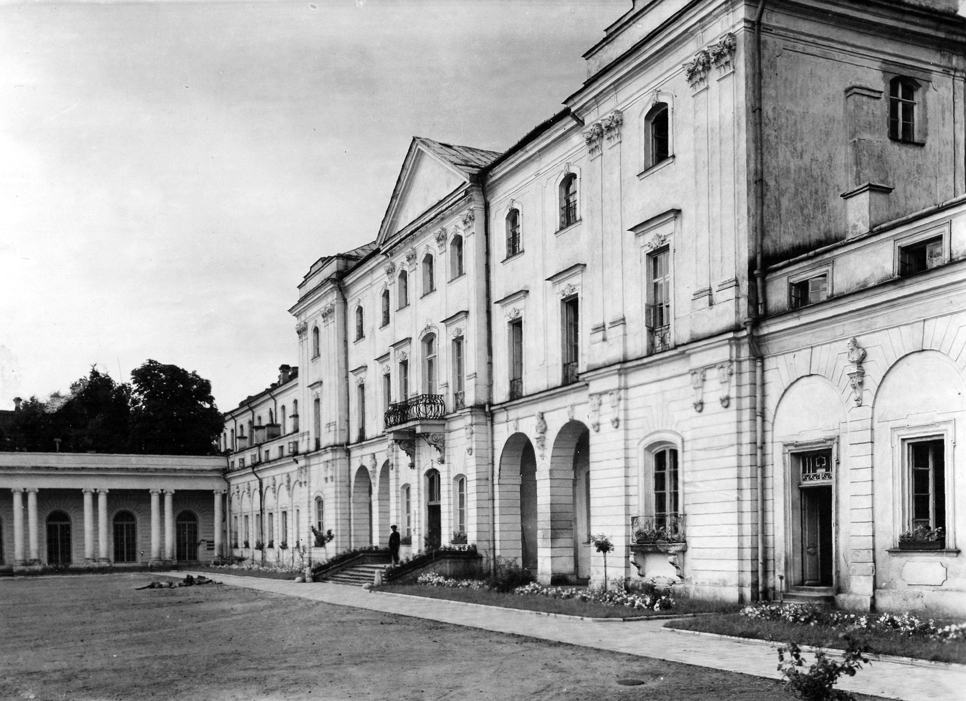 Fasada pałacu Branickich w Białymstoku